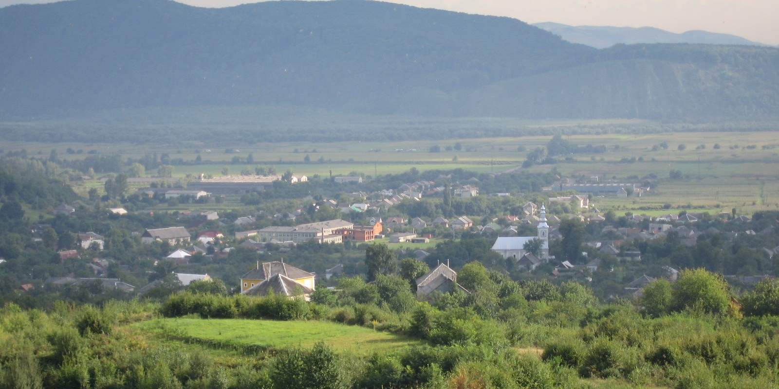 Рокосово